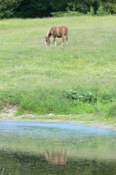 Лошадь у Алшиховского заросшего пруда